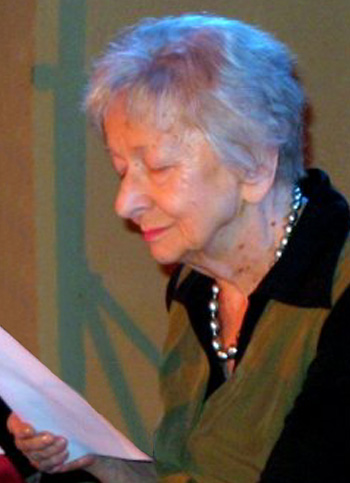 Wisława Szymborska, Polish poet, 1996 Nobel Prize laureate in Literature